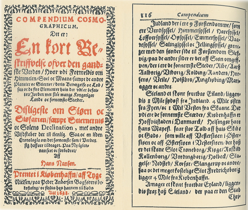 Titelblad og tekstside af Hans Nansens "Compendium Cosmographicum". 2. udg. 1638. Title leaf and textpage from Hans Nansens "Compendium Cosmographicum". 2nd ed. 1638.